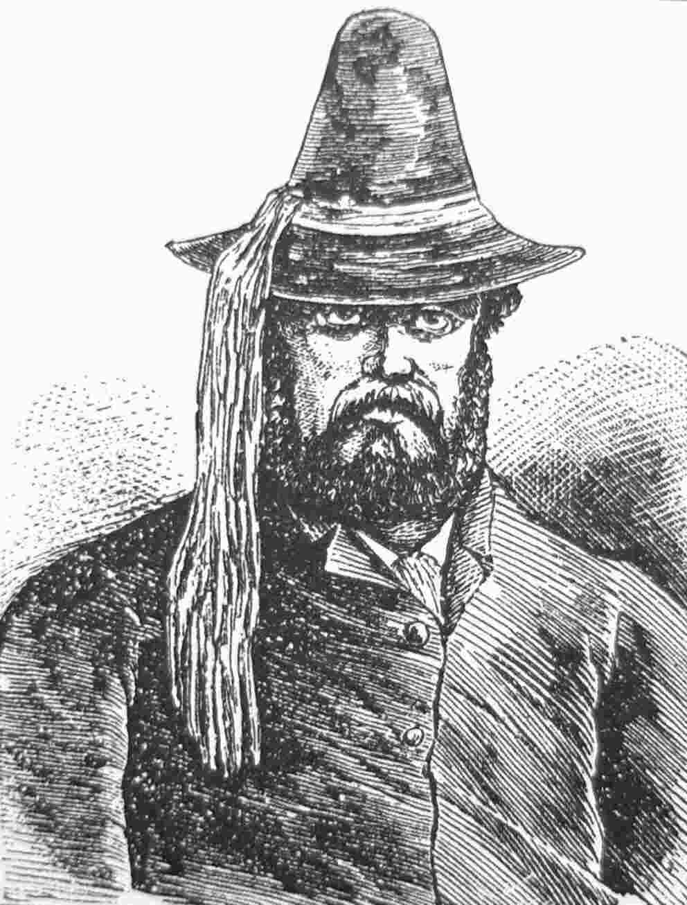 Litografia del Brigante Francatrippa